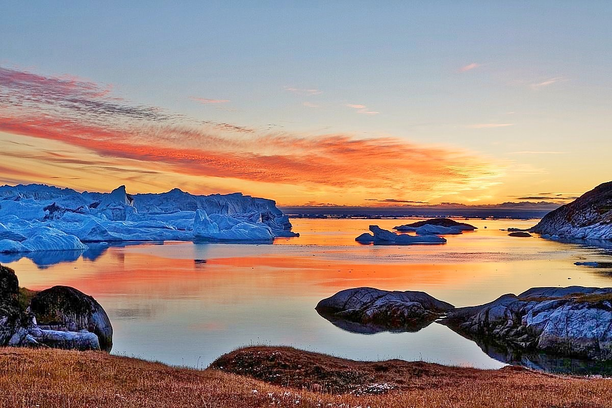 Rives de Sermermuit